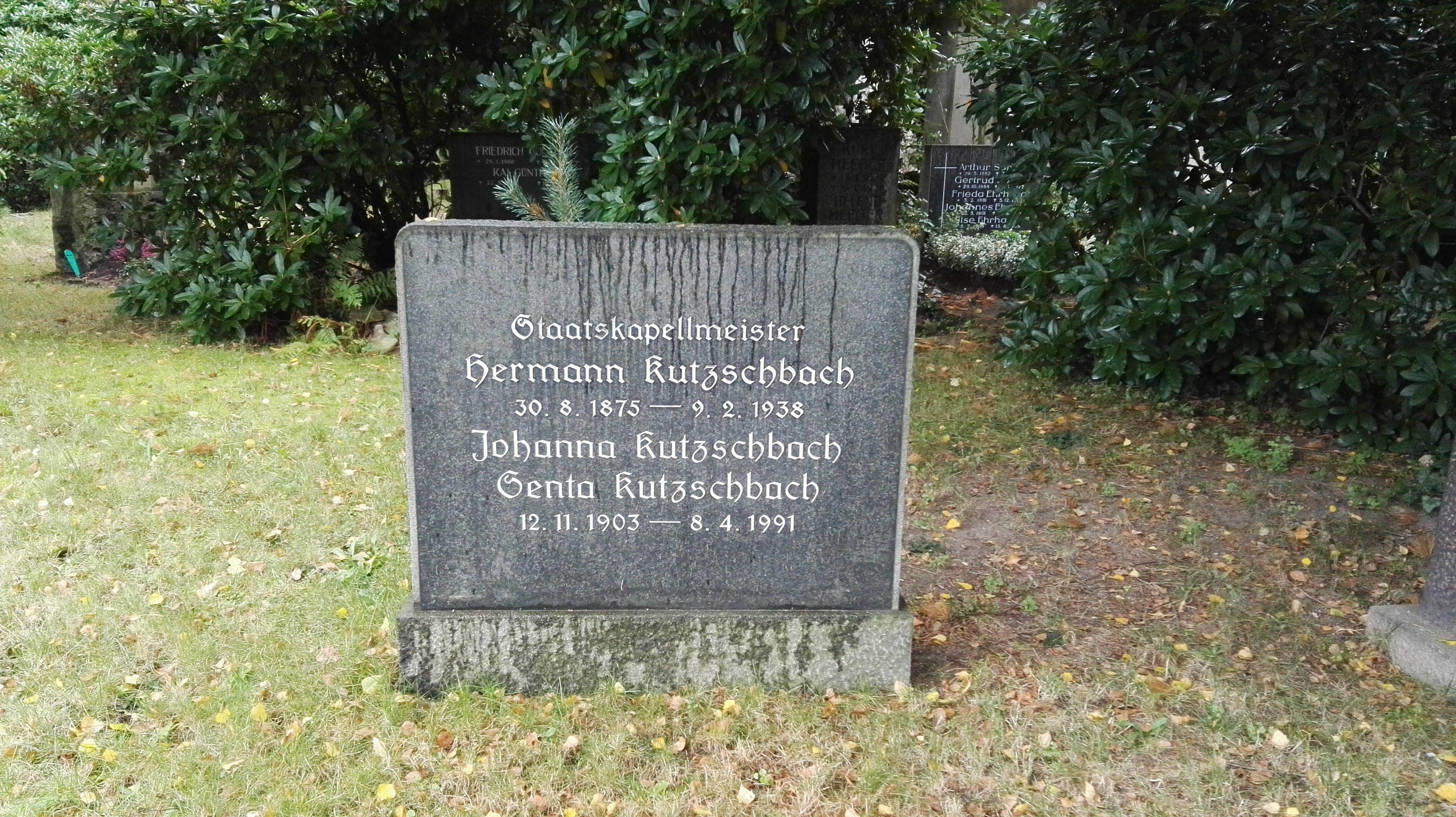 Grabstätte von Hermann Kutzschbach (Staatskapellmeister) auf dem Urnenhain Tolkewitz in Dresden